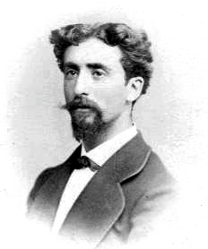 Portrait de Alexis Giraud-Teulon (1839-1916), French sociologist.